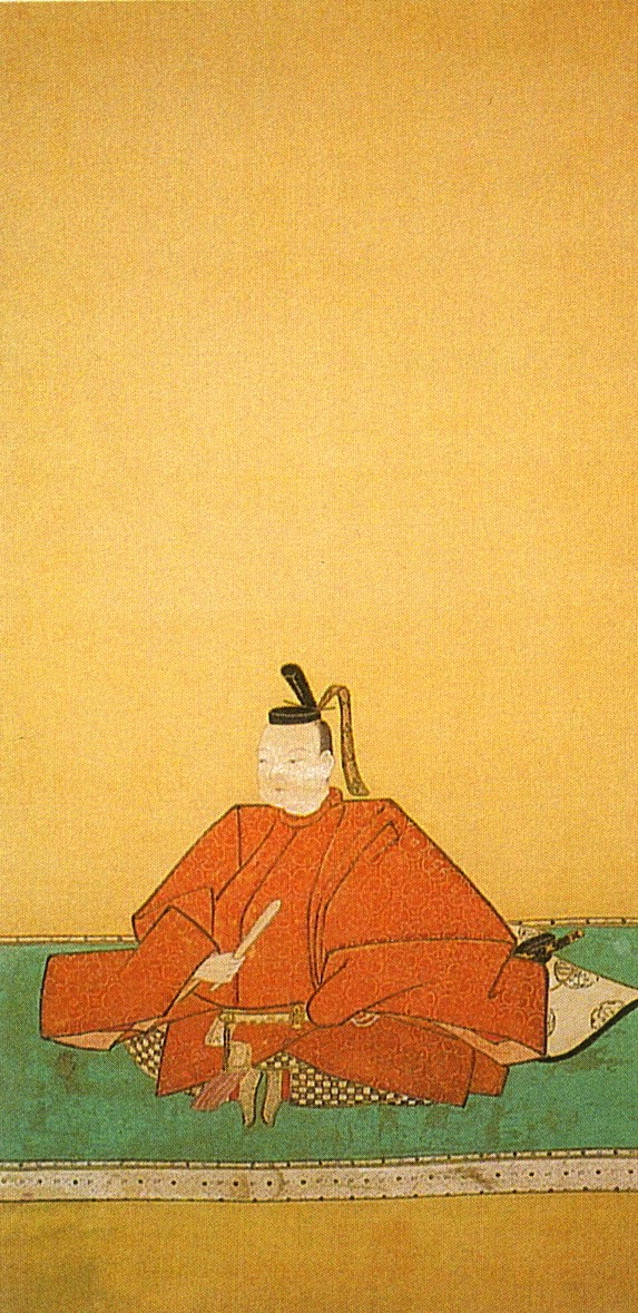 Shirakawa lord Niwa Nagashige 白河藩主丹羽長重